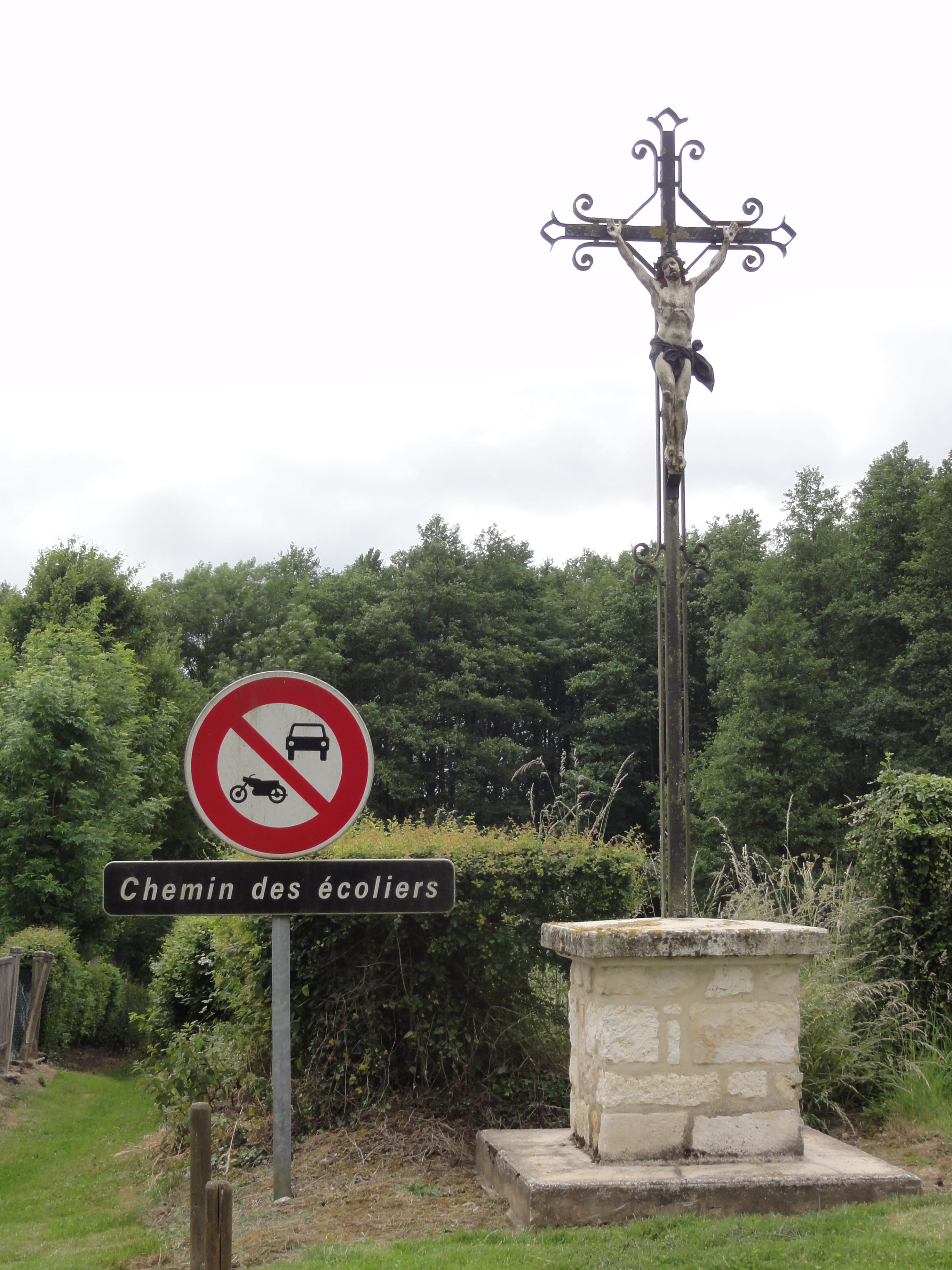 Beaumé (Aisne) city limit sign